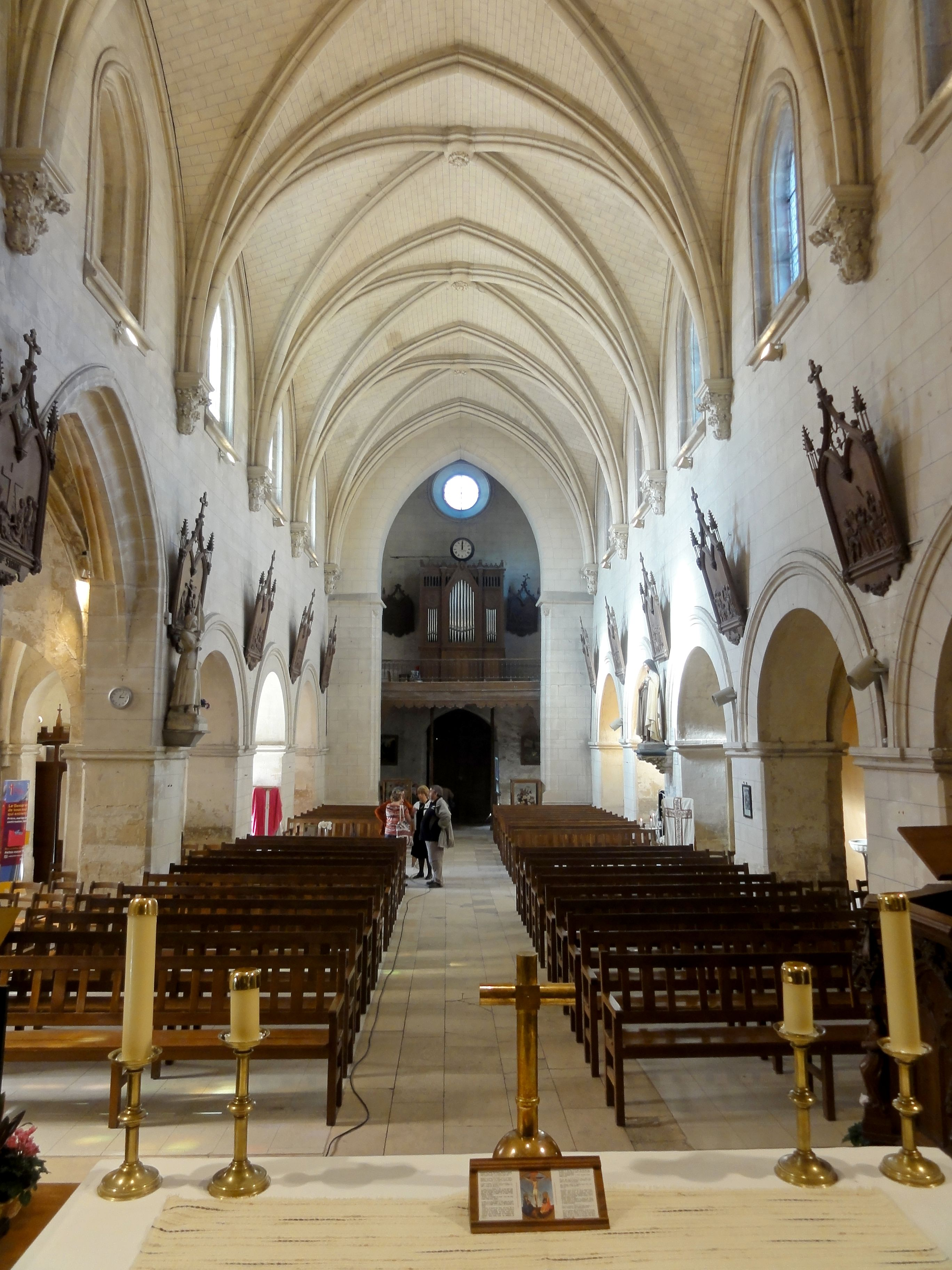 Nef, vue vers l'ouest.